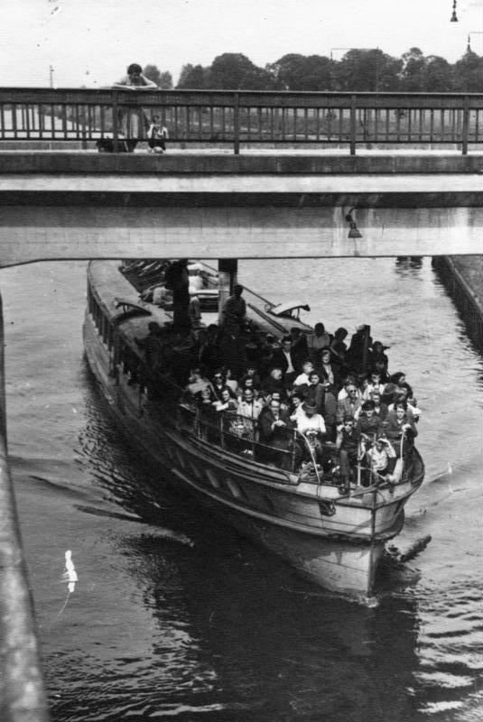 Schleuse Zerben, Dampfschiff fährt in Schleuse Illus-Bittner Auf dem Wasserwege nach Magdeburg, 1.7.47 U.B.z.: Der Dampfer beim Einfahren in die Zerbener Schleuse. 627-47